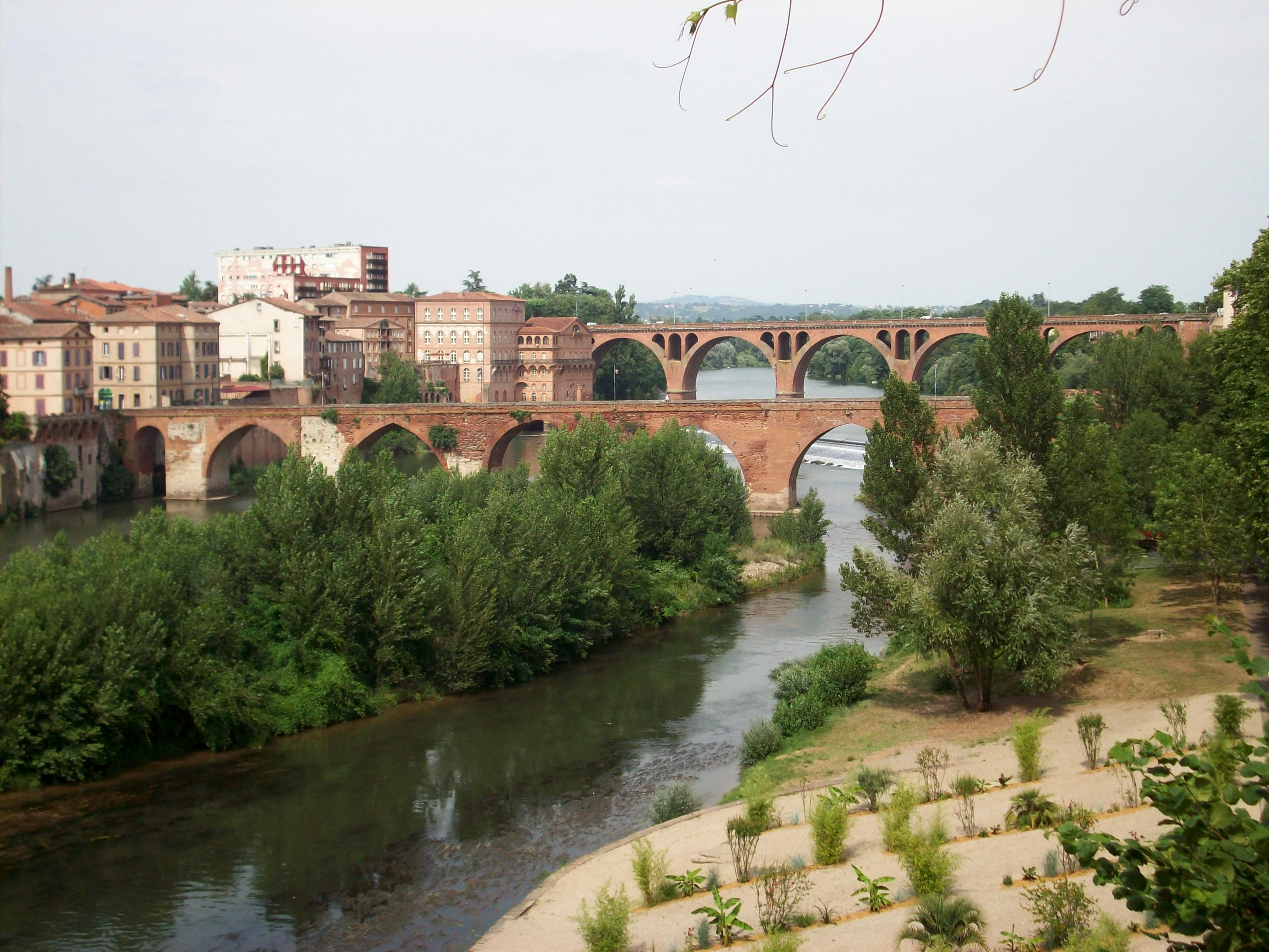 Pont Vieux et Pont Neuf d'Albi, Tarn, France